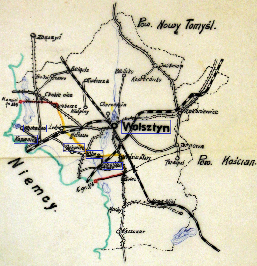 Szkic komisariatu SG Wolsztyn - lata 30. XX wieku